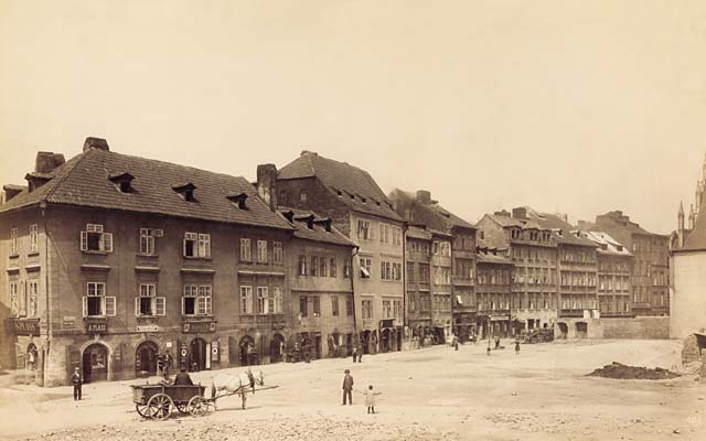 Západní strana Úzké ulice (dnes na tom místě Maislova) poté, co byla protější strana ulice odbourána. Vpravo část Maislovy synagogy.